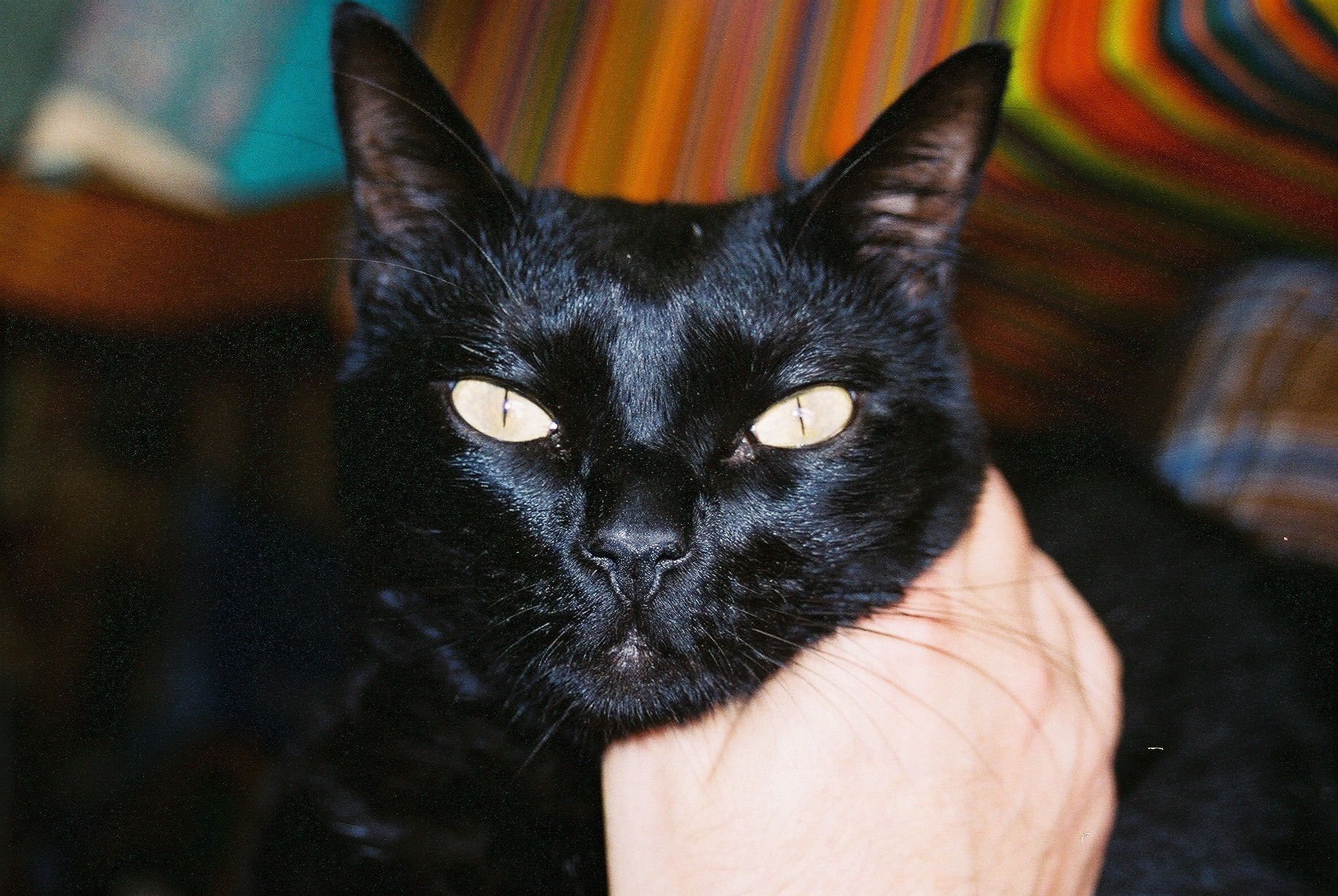 chat apprivoisé